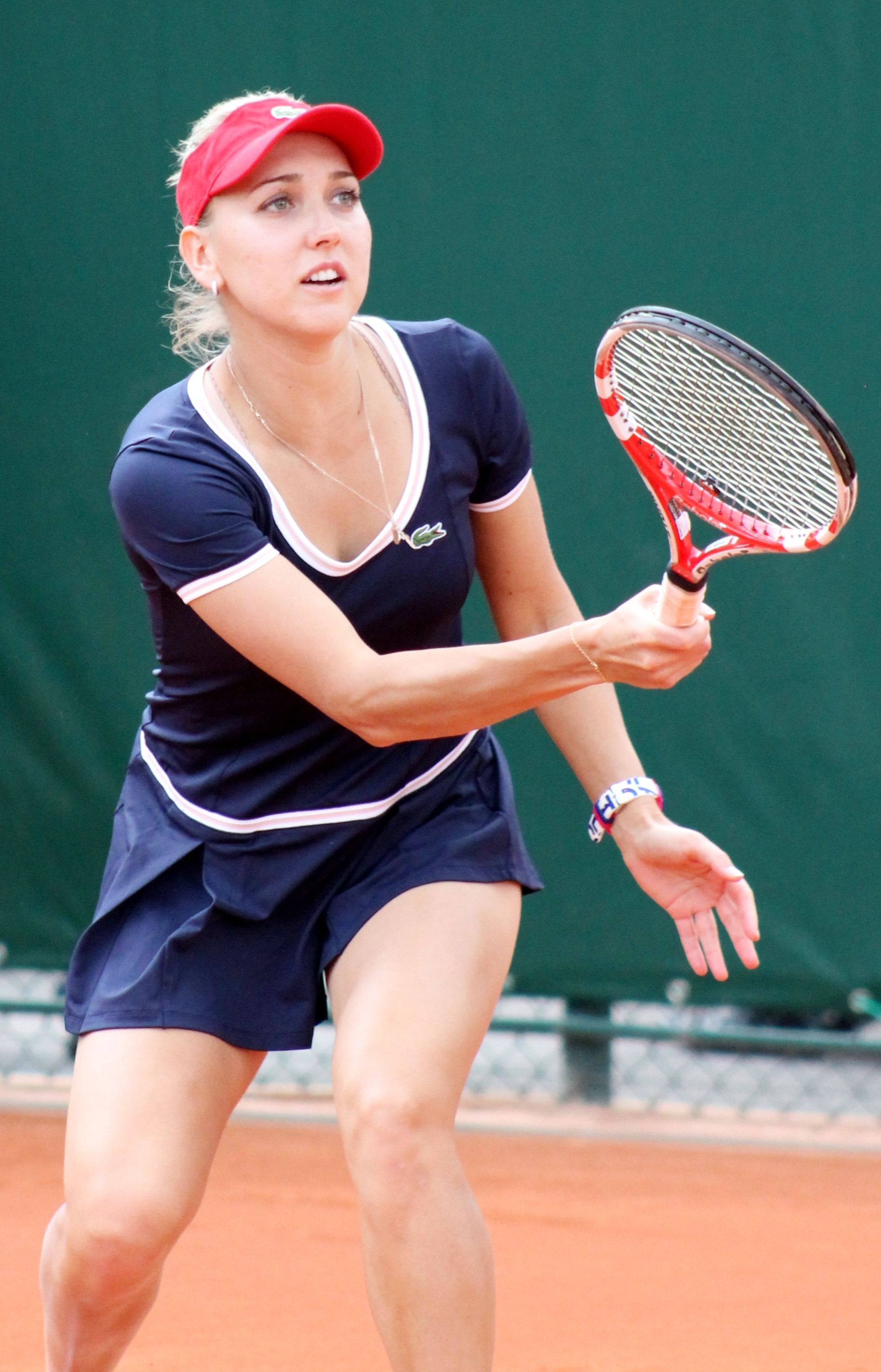 Vesnina RG13 (4)